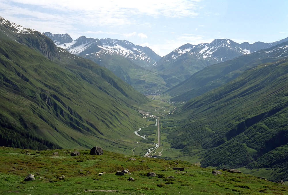 Urserental vom Furkapass aus gesehen